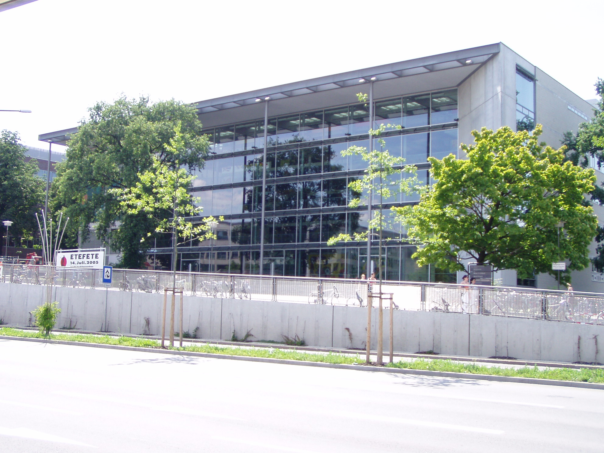 Hörsaalzentrum der TU Dresden in der Bergstraße